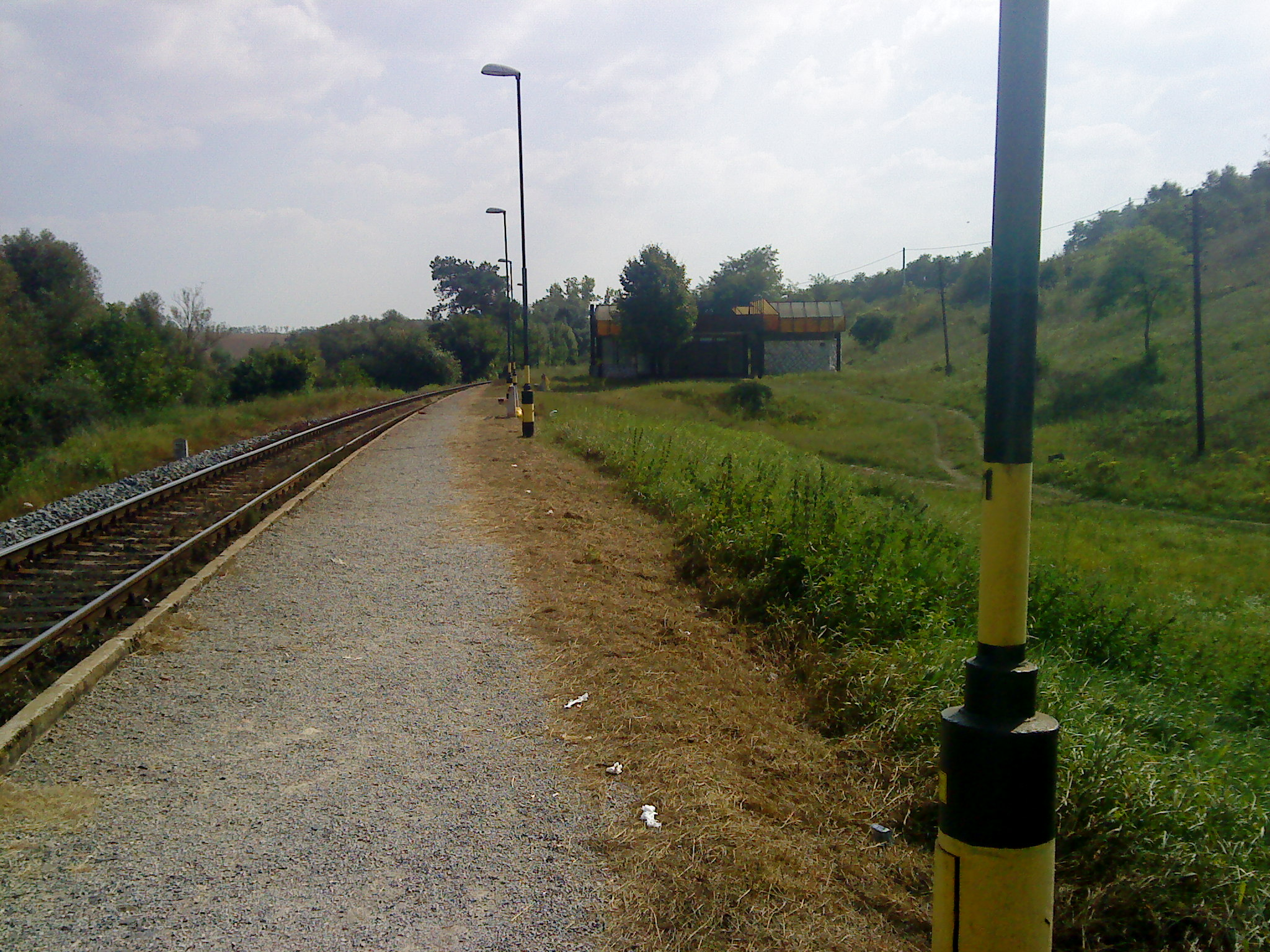 Szőkédi vasútállomás